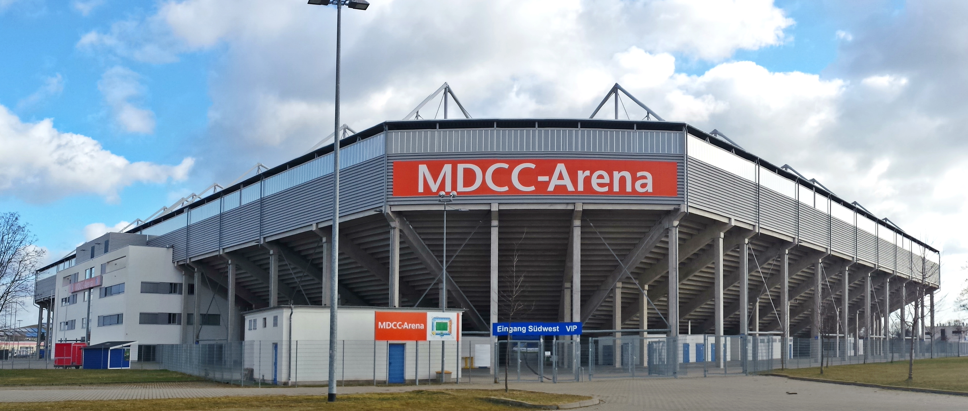 Außenansicht der MDCC-Arena in Magdeburg